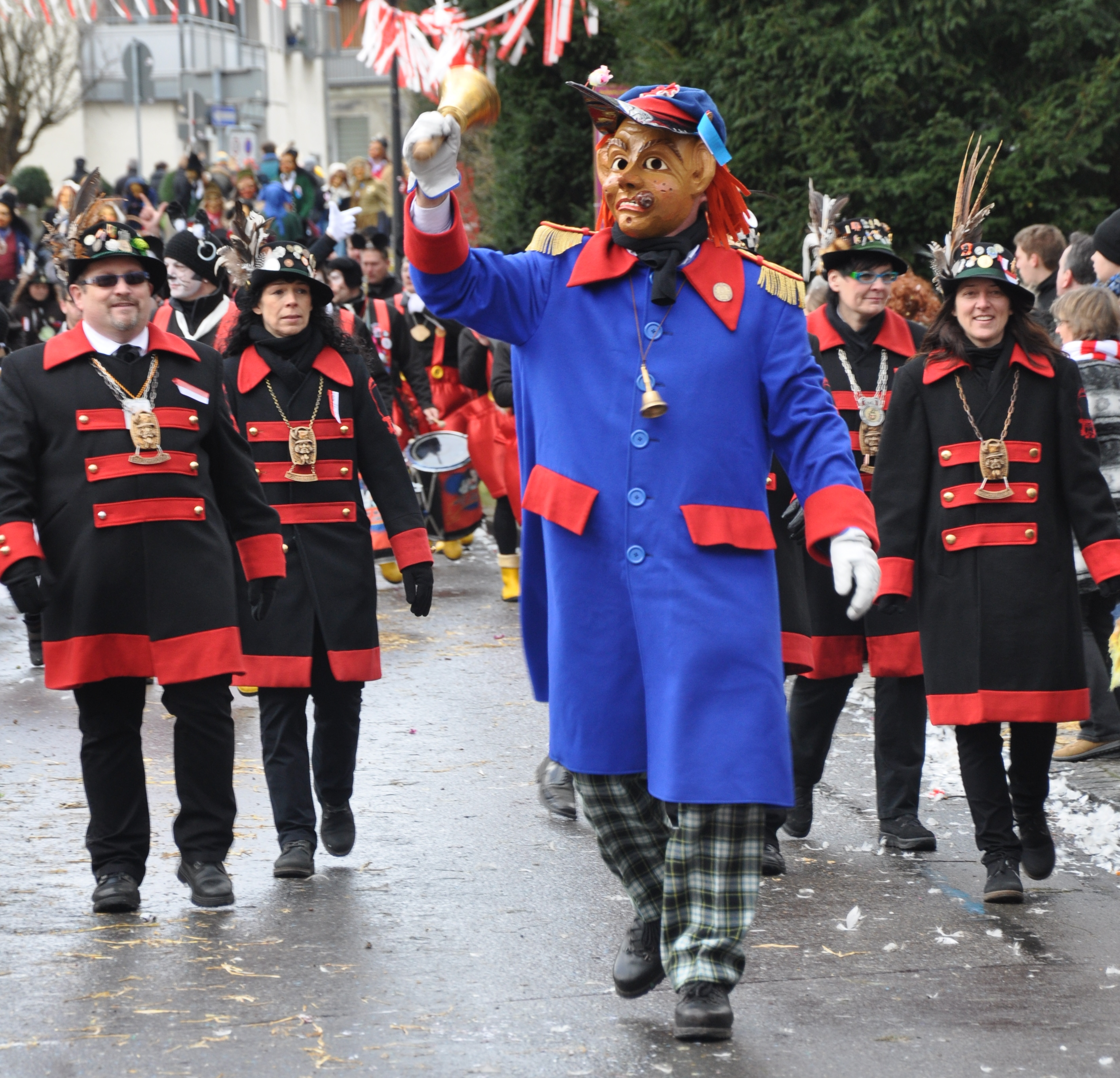 Ravensburger Schwarze-Veri-Zunft e. V., Ravensburg; Büttel („Schreikraga“) und Zunftrat Fotografiert beim Ringtreffen des Alemannischen Narrenrings (ANR) 2014 in Weingarten; Narrensprung am 9. Februar 2014